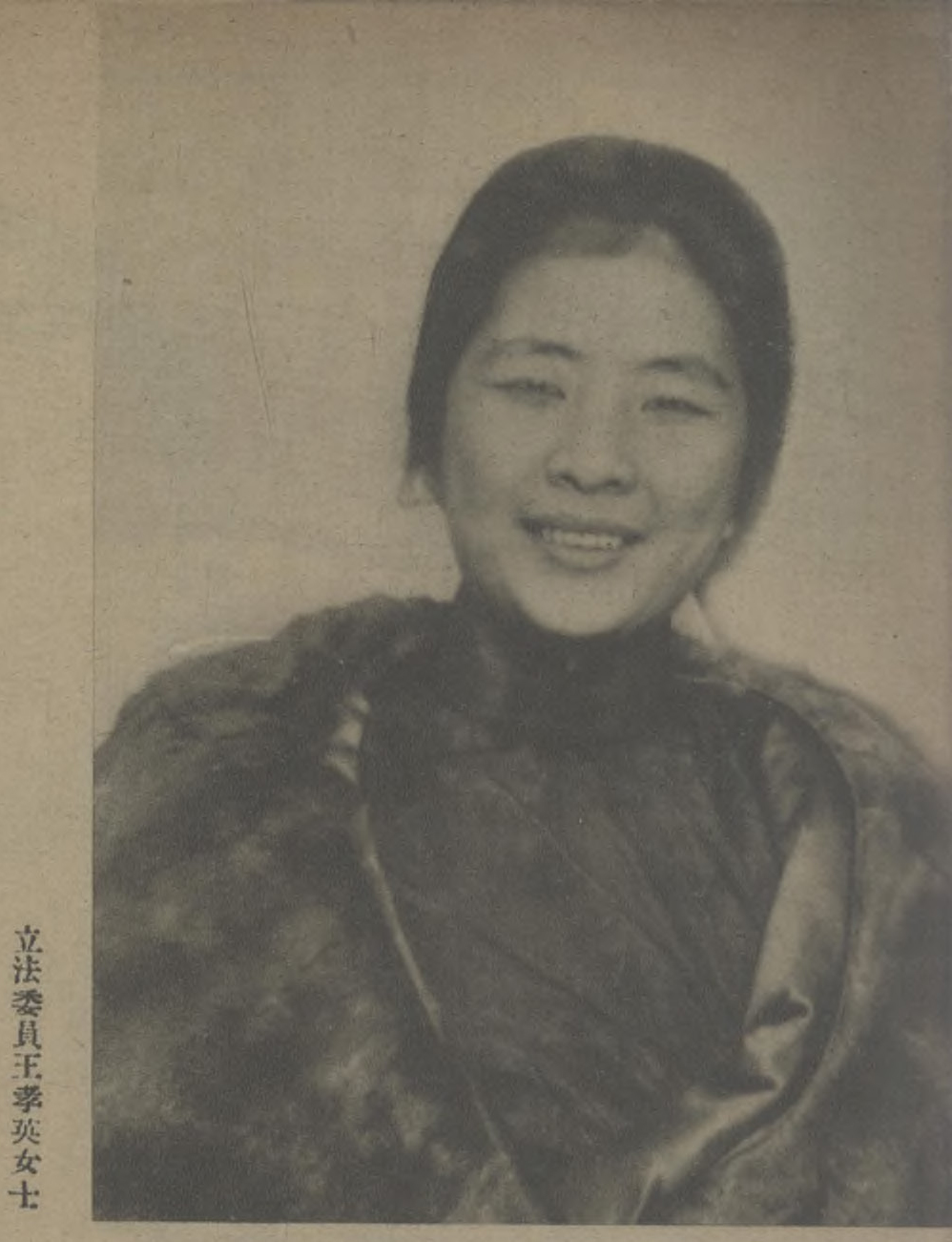 立法委員王孝英女士